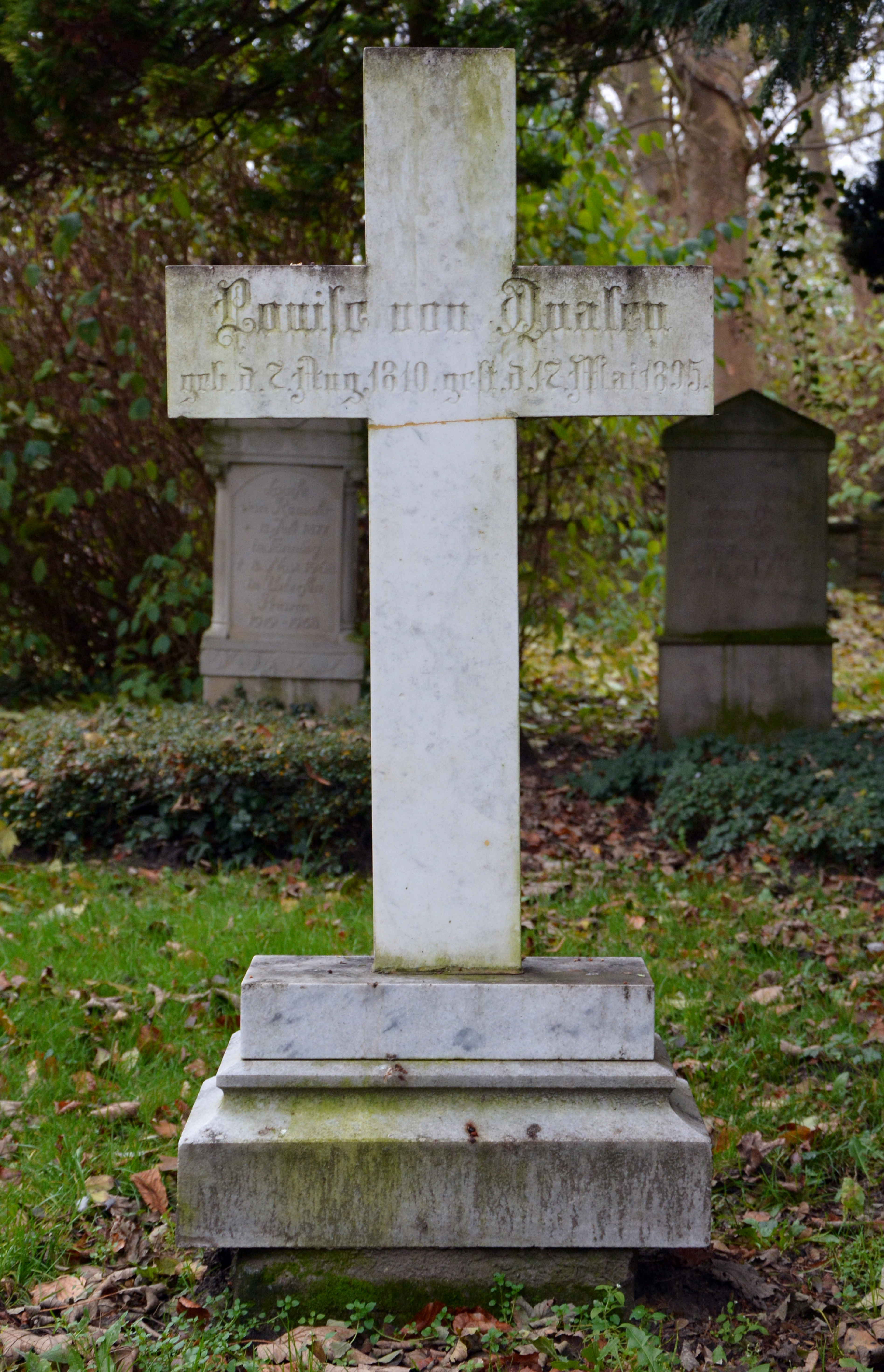 Das Grabkreuz der deutschen Gräfin, Wohltäterin und Stiftsdame des Klosters Uetersen Josiane Louise Bernhardine Desirèe von Qualen (* 7. August 1810; † 17. Mai 1895 in Uetersen)